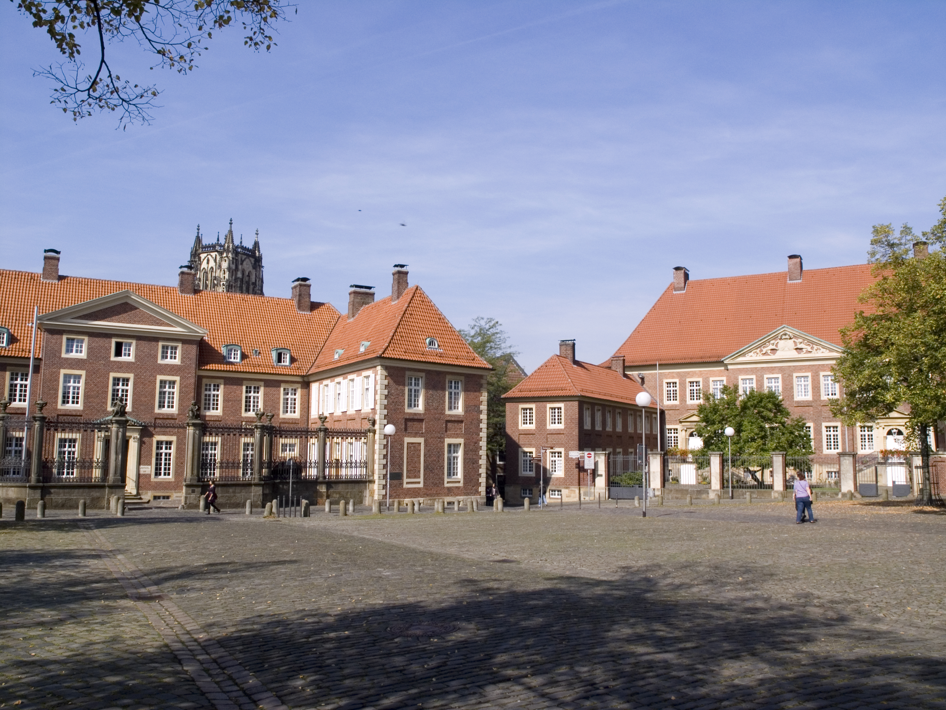 NRW, Munster, Altstadt, Domhof. Links das Bischöfliche Palais, rechts die Kettelersche Kurie